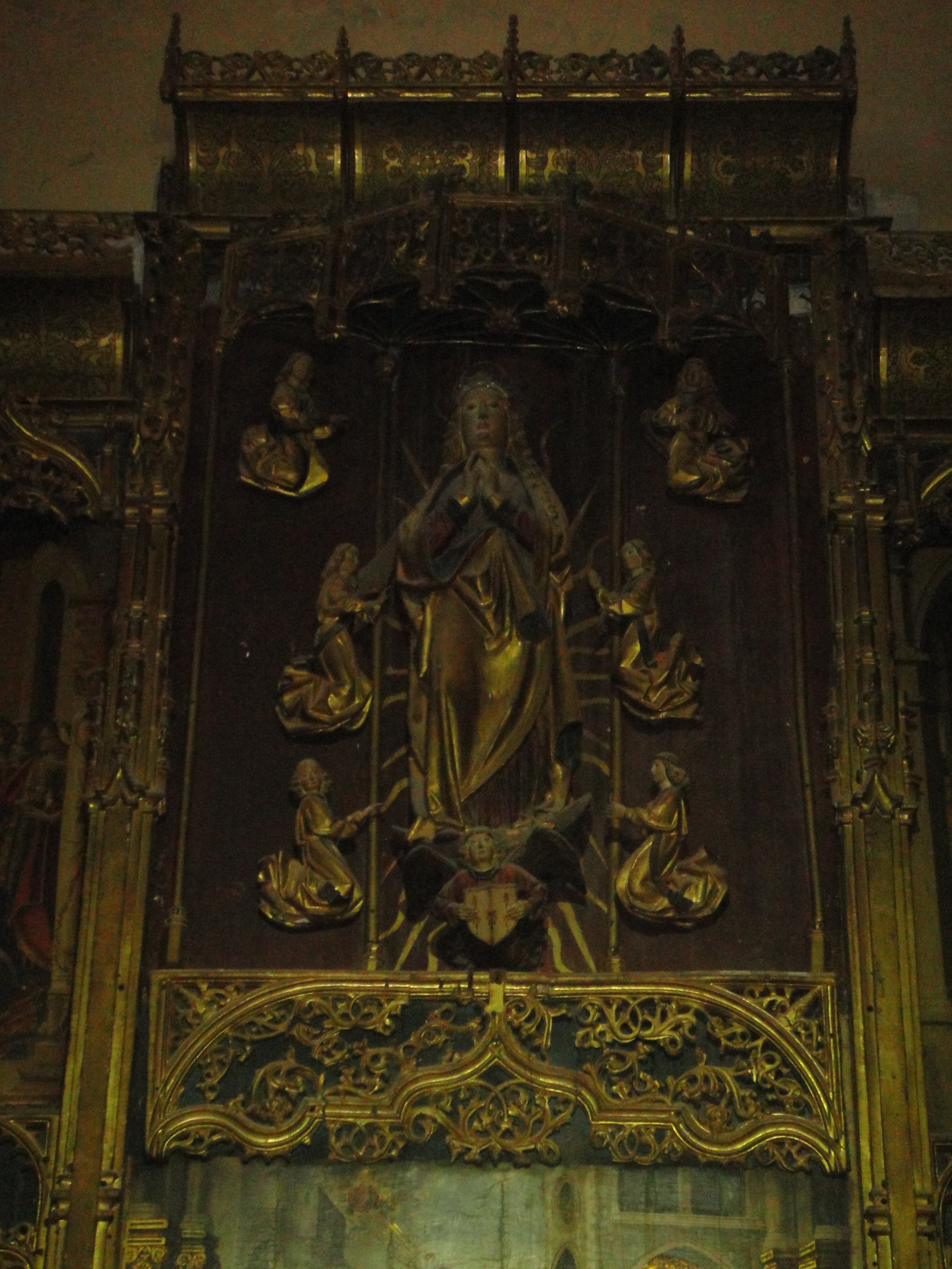 Cuerpo superior o remate del retablo de la capilla del Sagrario de la iglesia de Nuestra Señora del Castillo de Fuente Obejuna.